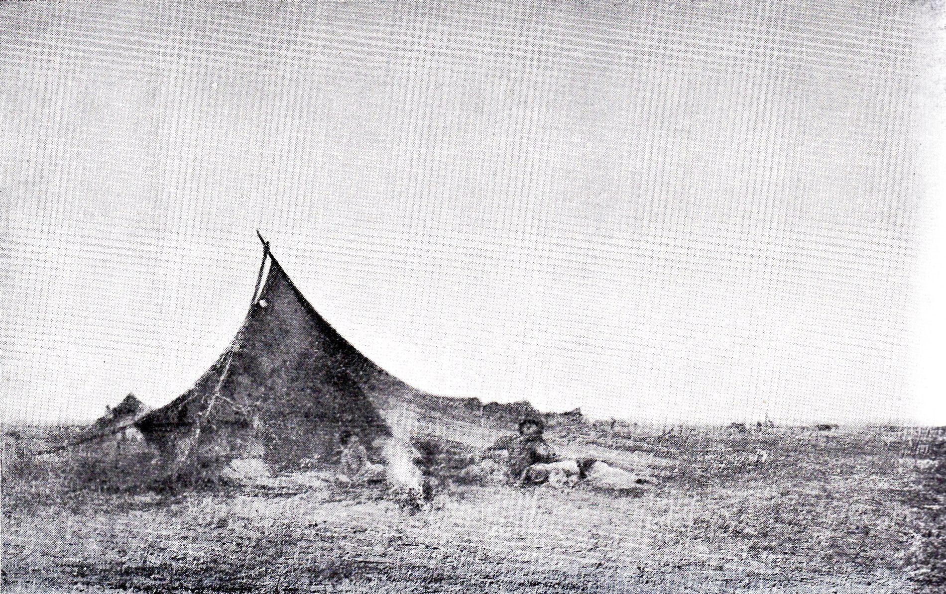 Corturi de țăgani la apusul soarelui